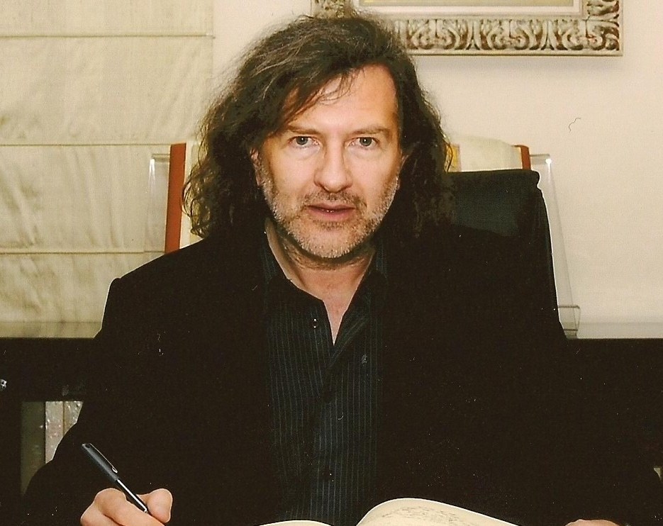 Claudio Rodríguez Fer na Casa de Galicia en Madrid